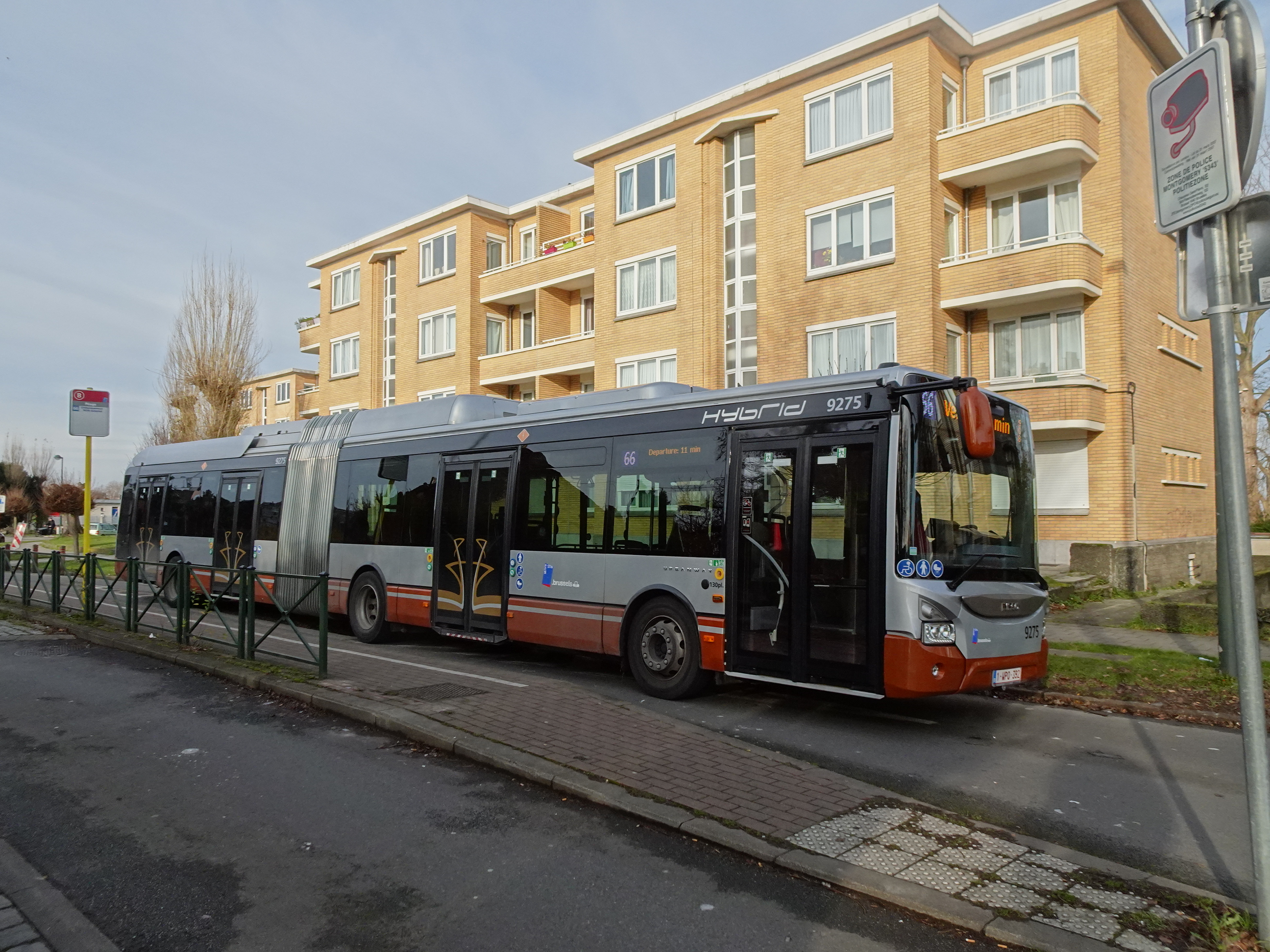 Nouvel Iveco Urbanway 18 Hybride au terminus de la ligne 66